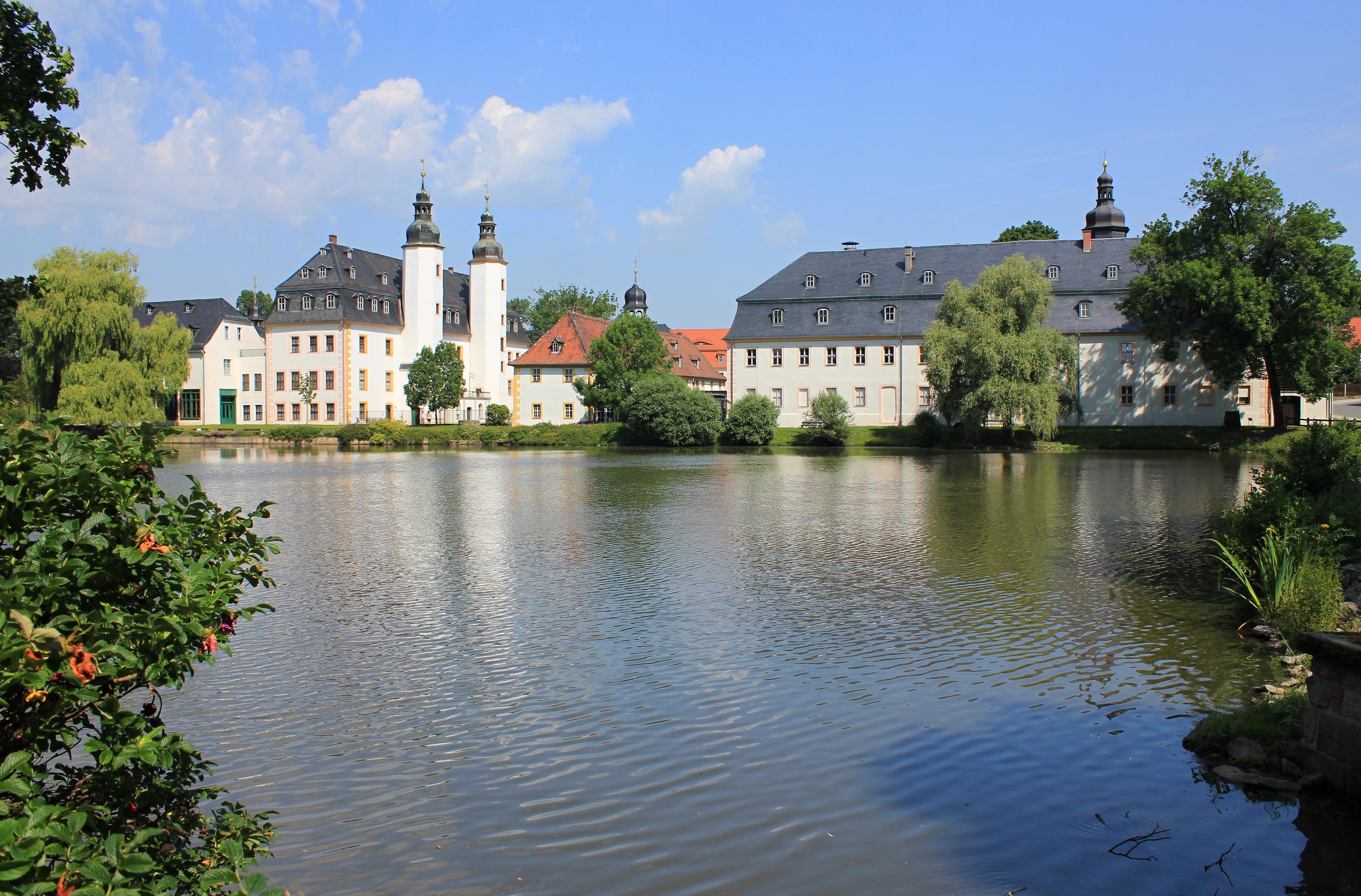 In der Nähe von Crimmitschau befindet sich Schloss Blankenhain mit dem dazugehörenden Teich.